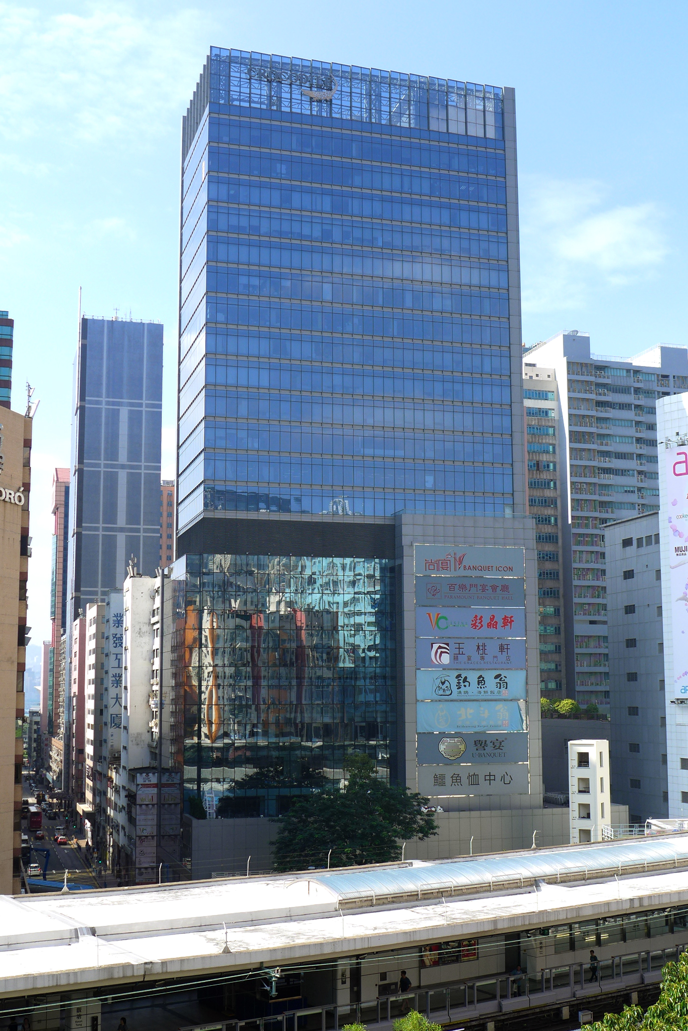 Crocodile Centre